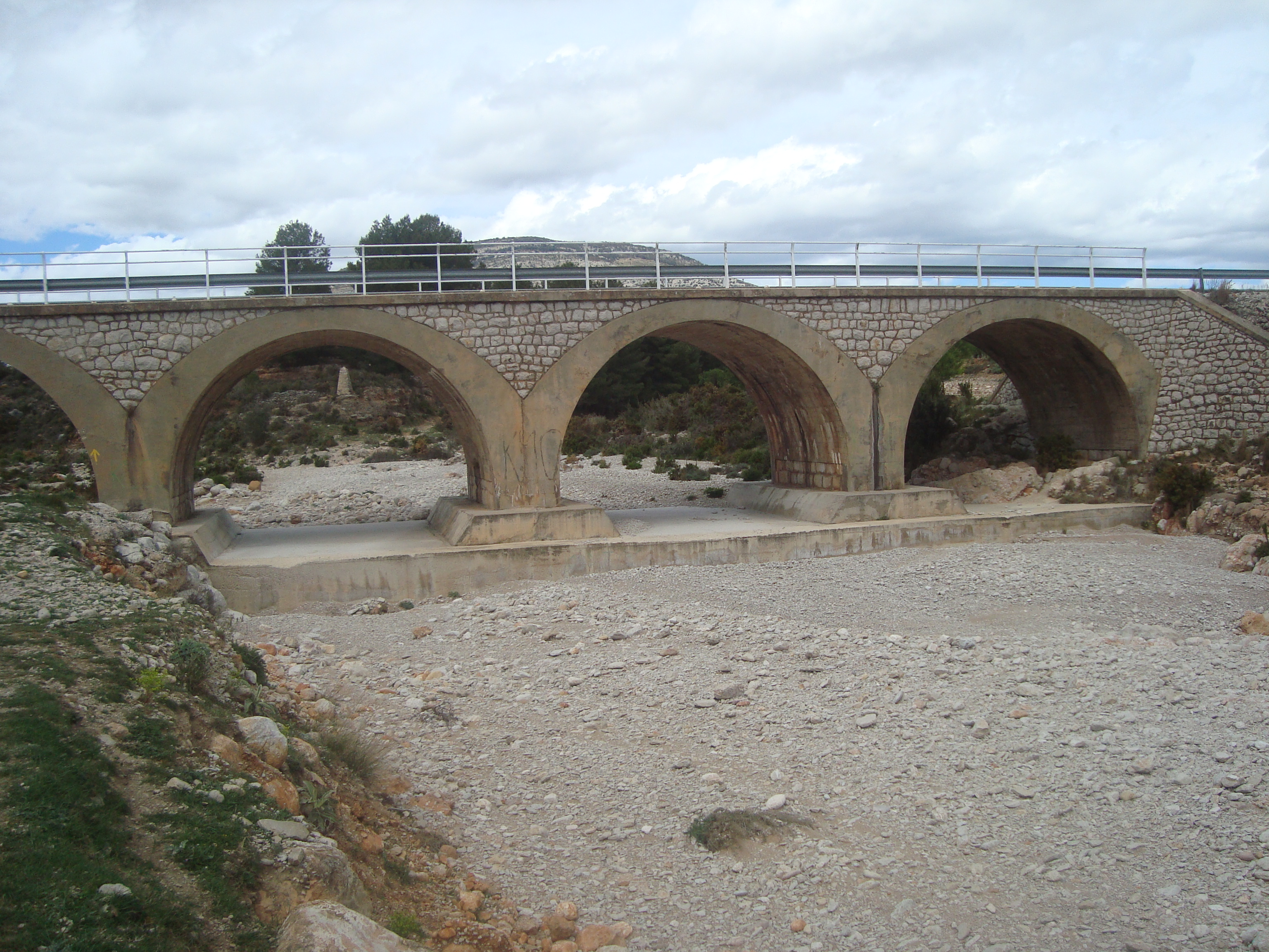 Rambla Carbonera (Castellón)